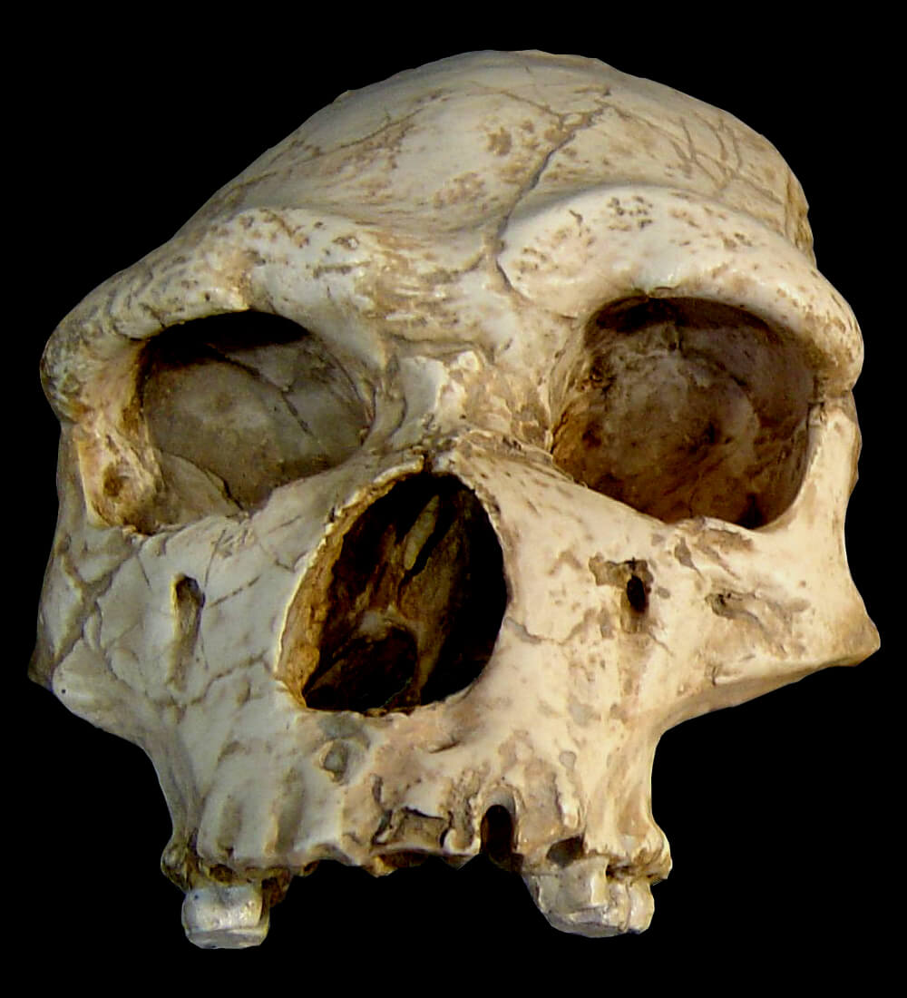 Moulage du crâne de l’homme de Tautavel – photographie personnelle prise en octobre 2004, publiée en GFDL pour wikipedia – utilisateur:Luna04